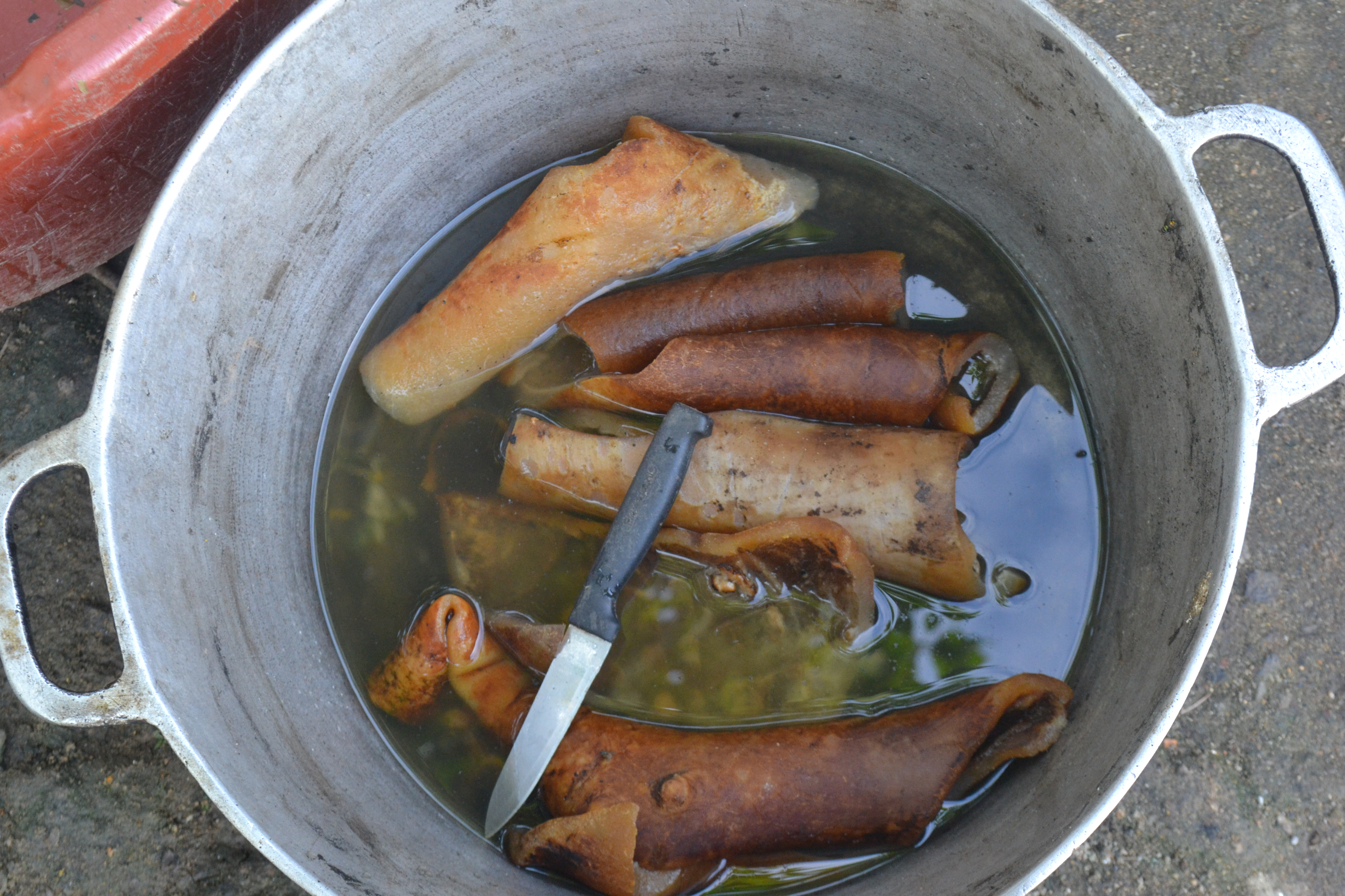 La peau de boeuf, préparée et lavée